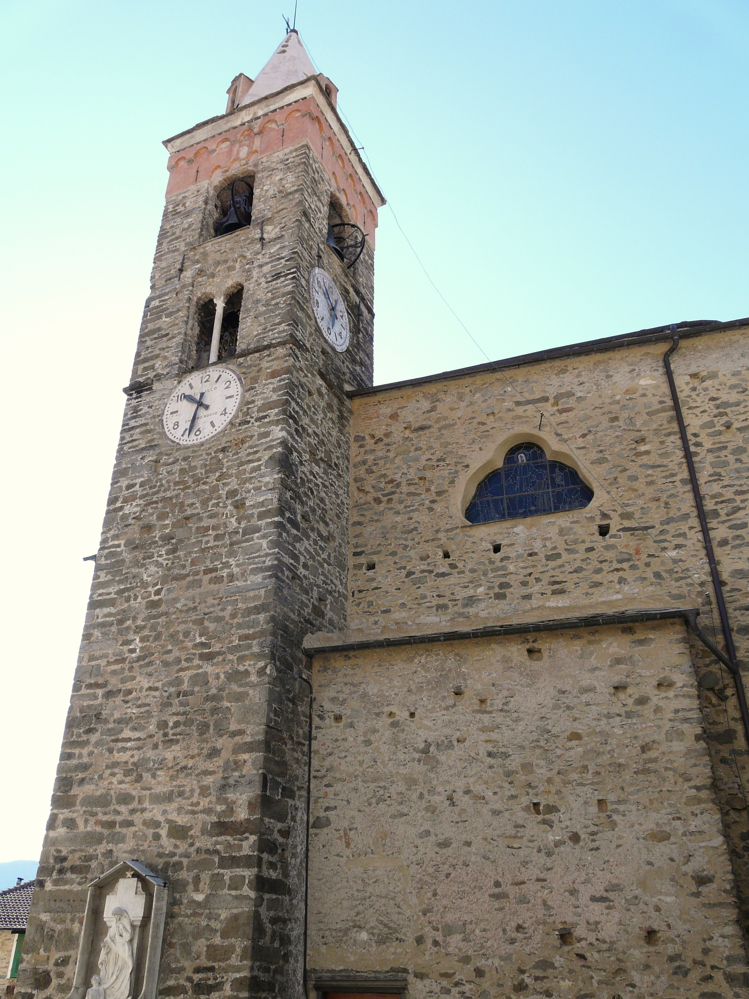 Chiesa dei Santi Nazario e Celso, Mendatica, Liguria, Italia